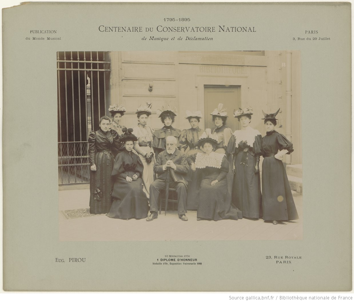 photographie par Eugène Pirou de la Classe d'harmonie femmes du Conservatoire national de musique de Paris en 1895, professeur Adrien Barthe, à l'occasion du centenaire du Conservatoire